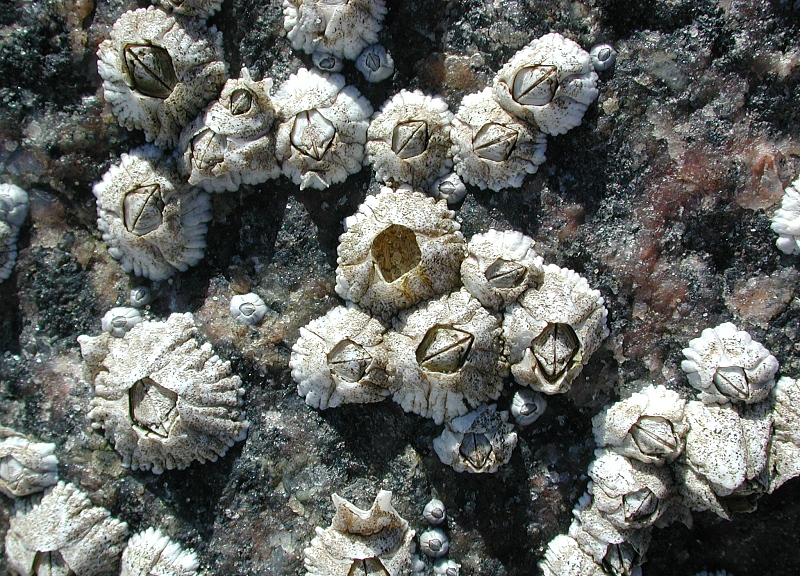 Seepocke, Balanidae, Sylt, Deutschland, Nordsee